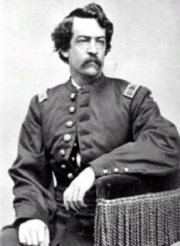 Henry Blanchard Freeman